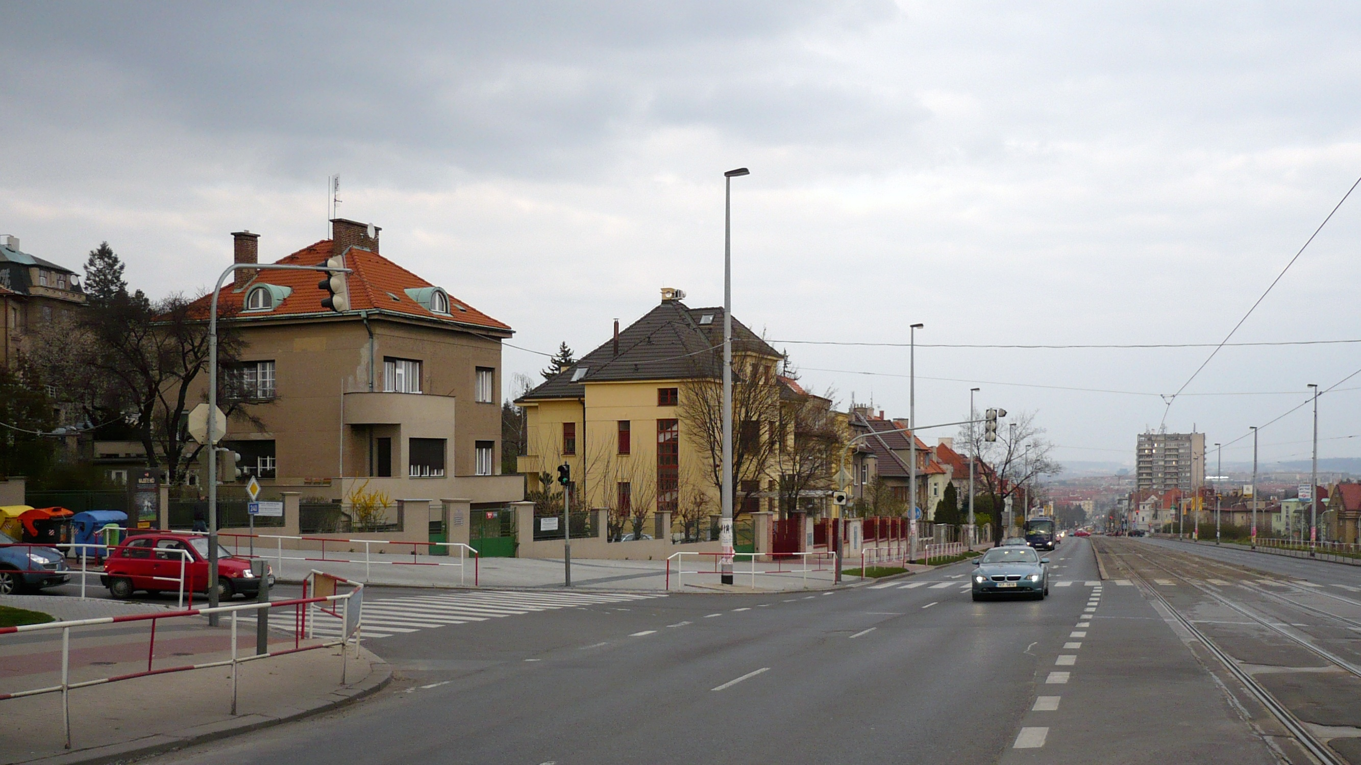 Praha, hranice čtvrtí Vokovice a Dejvice - křižovatka ulic Horoměřická a Evropská